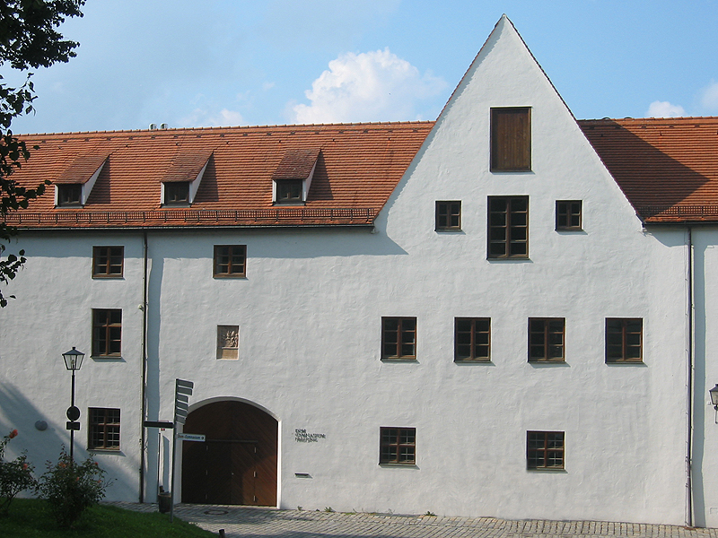 Dom-Gymnasium Freising (Ehem. Phillipsschloss)